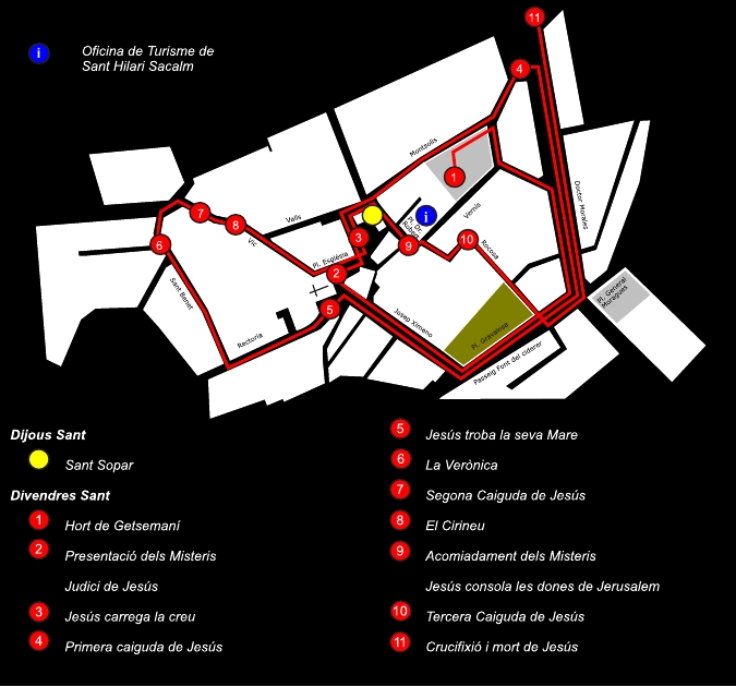 Ruta Via Crucis Vivent pels carrers de Sant Hilari Sacalm